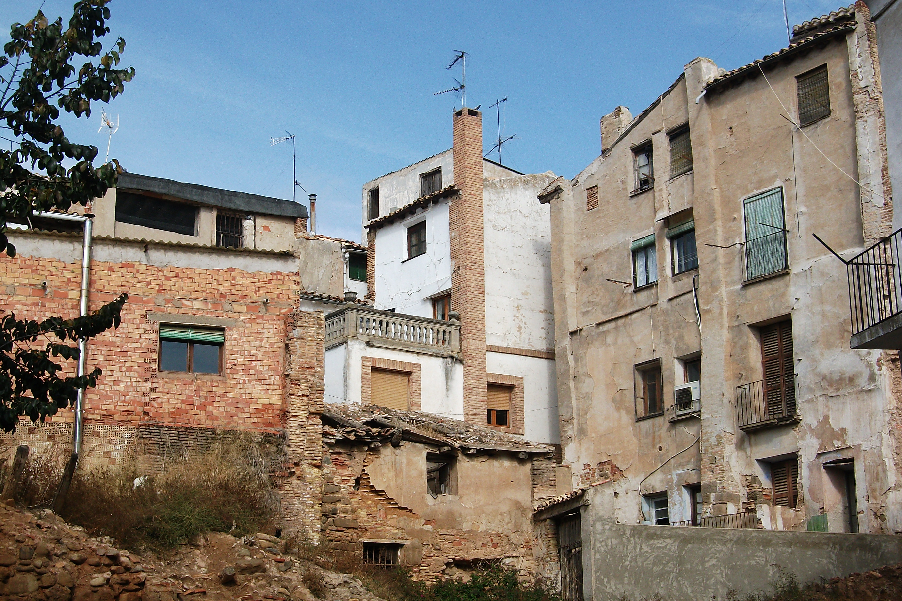 Corella. Imagen del pueblo. Noviembre de 2011